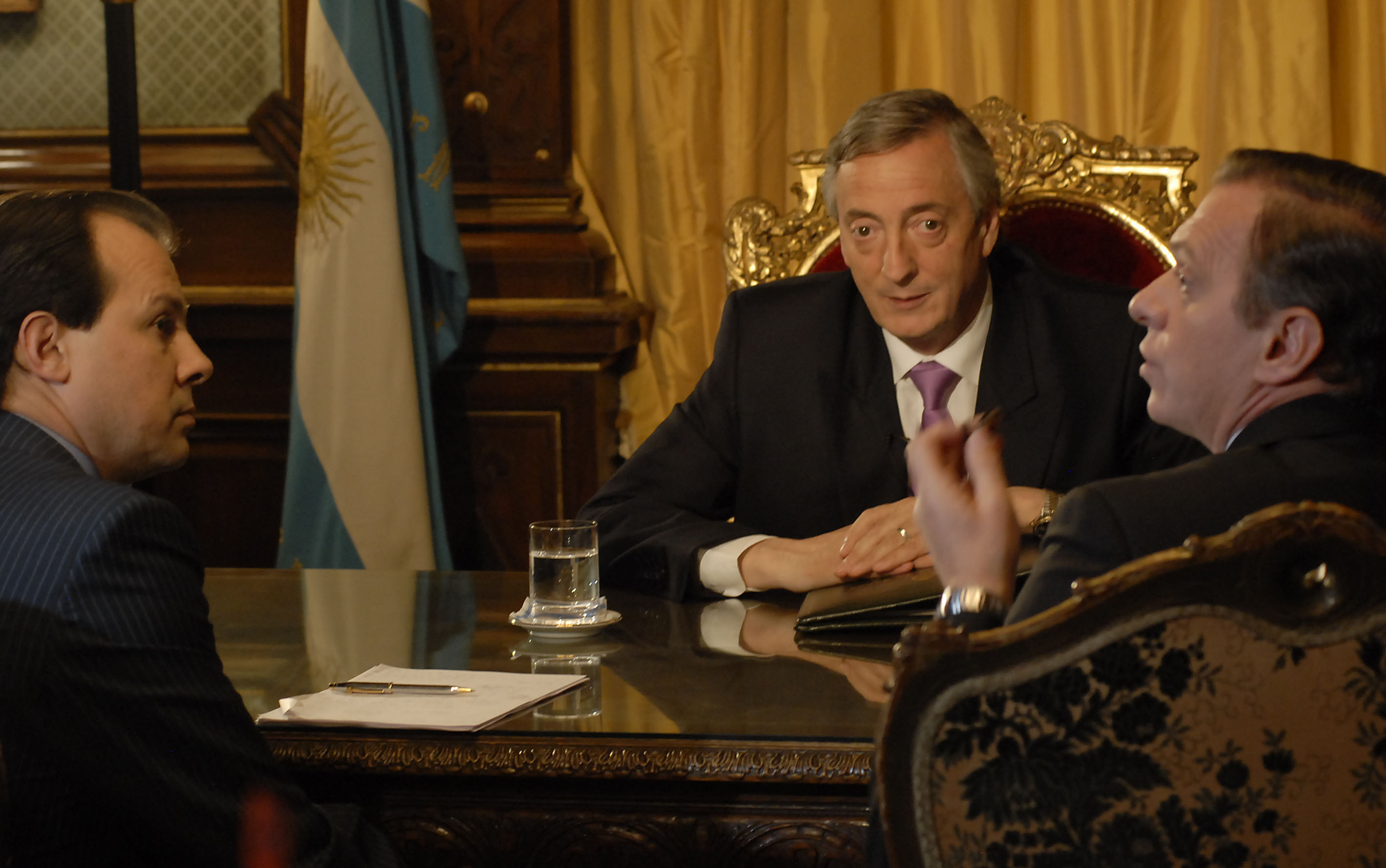 Casa Rosada, Despacho Presidencial - El presidente Néstor Kirchner fue entrevistado para el programa "A Dos Voces" por los periodistas Marcelo Bonelli (der.) y Gustavo Sylvestre.